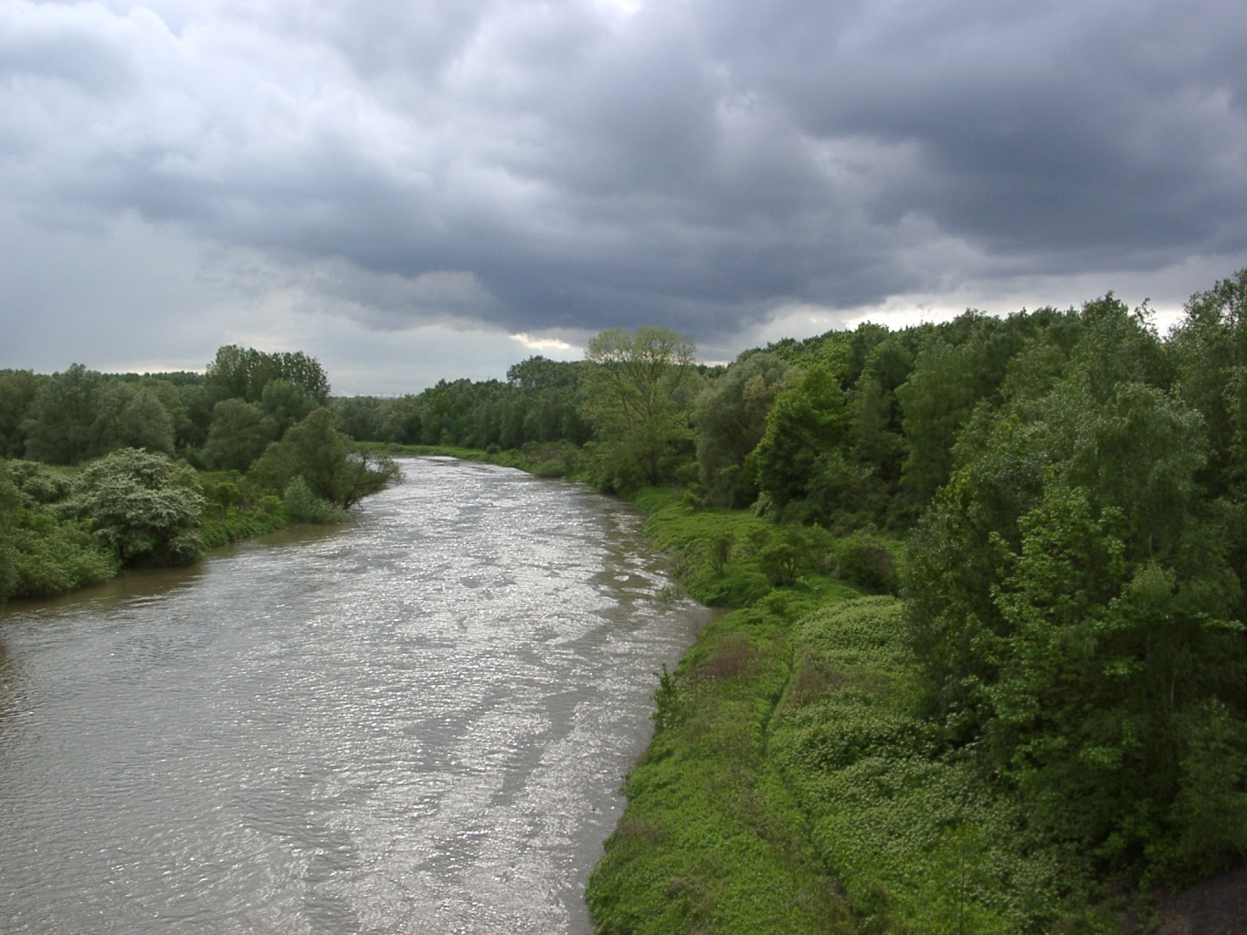 Lippe (Fluss) in Lünen, Nordrhein-Westfalen, Blick von der Brücke Zwolle-Allee nach Westen; Naturschutzgebiet „Lippeaue von Wethmar bis Lünen“